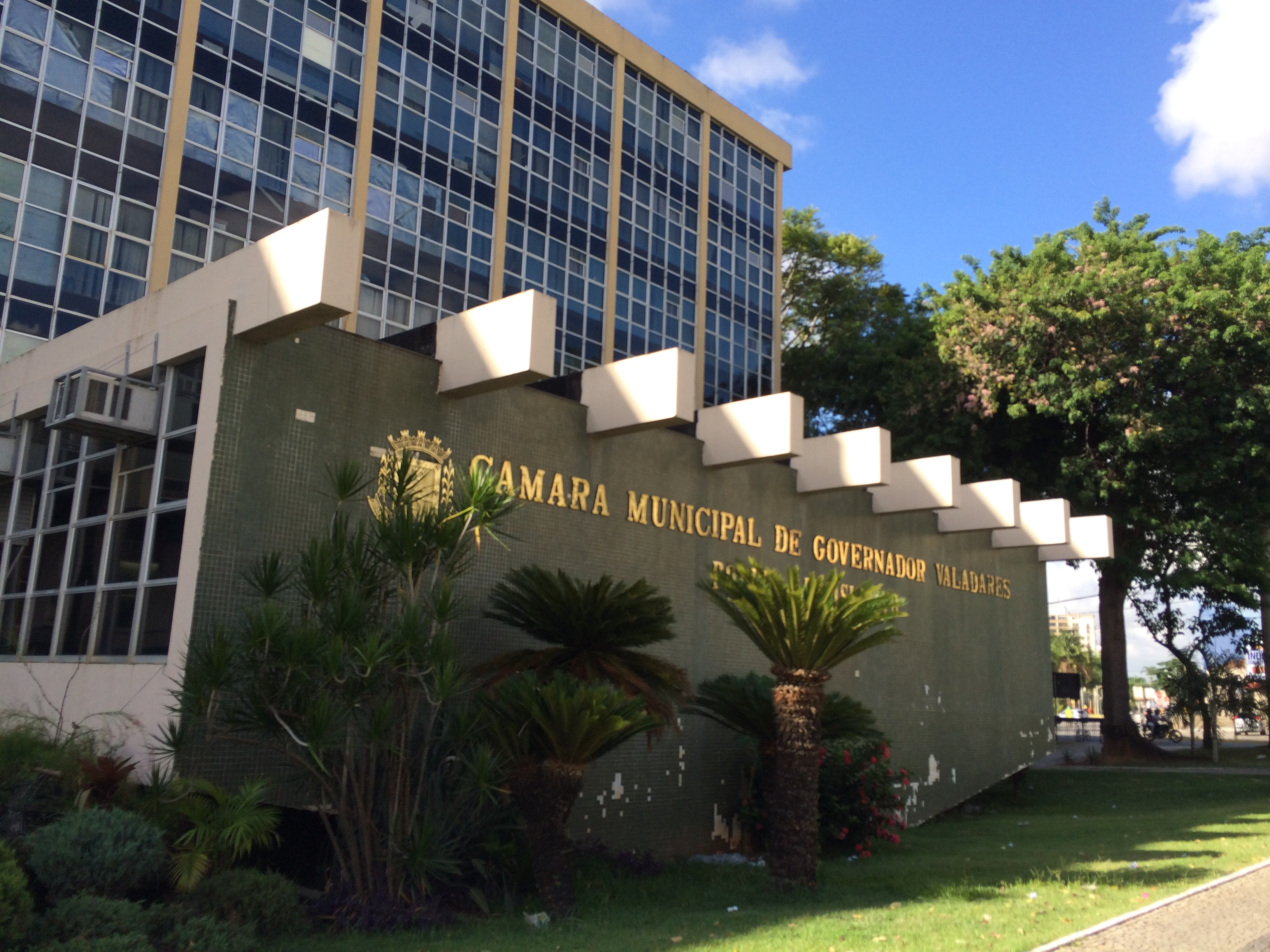 Camara Municipal de Governador Valadares, MG